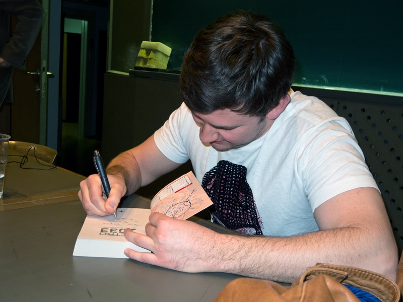 Konvencija Kontakt, koja je spojila 34. SFeraKon i 34. Eurocon u Zagrebu